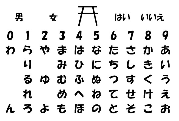 Таблица для японского гадания